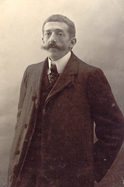 Fotografía a 3/4 de Manuel Martínez de la Escalera, tomada en torno a 1900